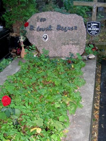 Bogusz Bilewski's monument (Powązki Cemetery)